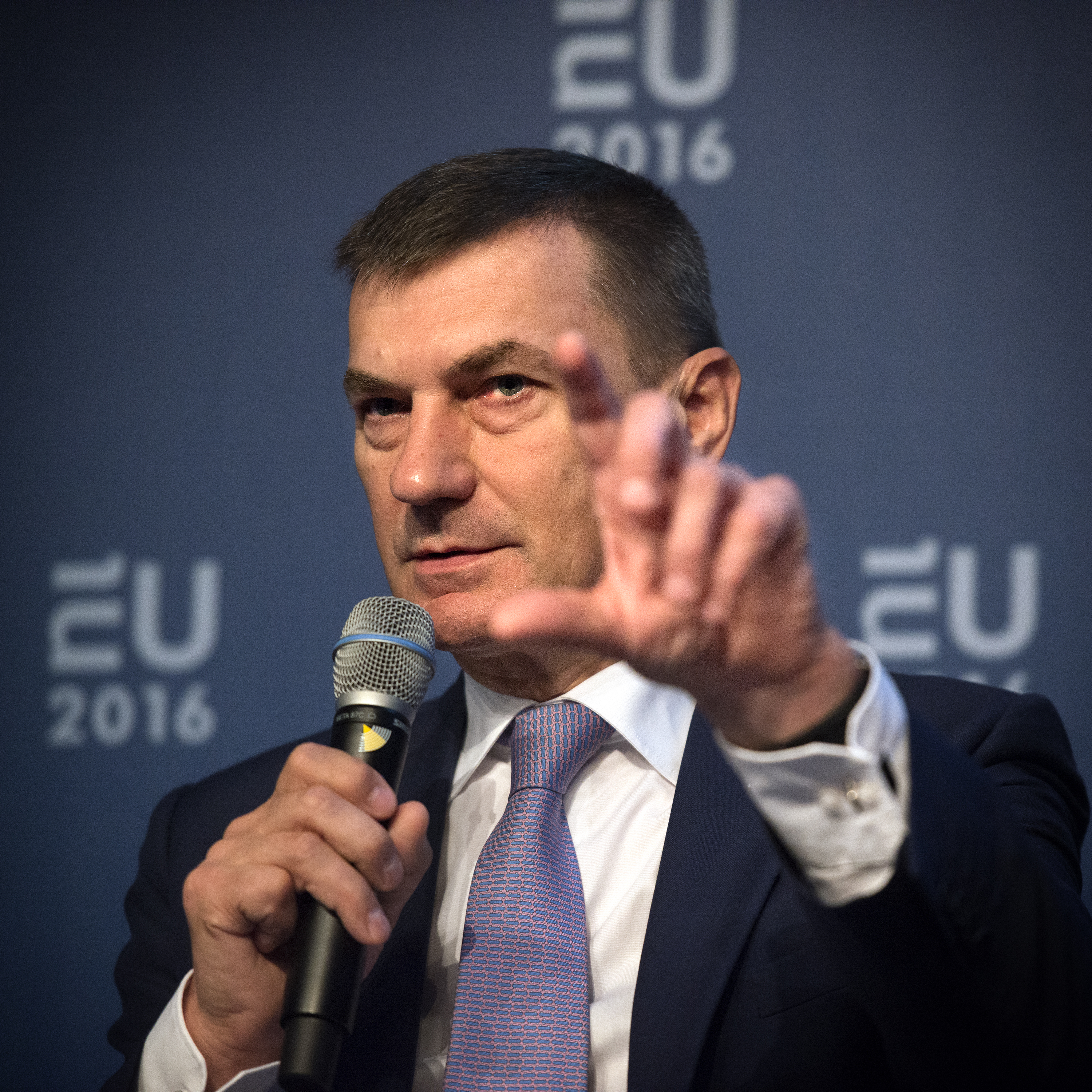 Nederland, Amsterdam, Conferentie "Digital and open government: next step to maturity"